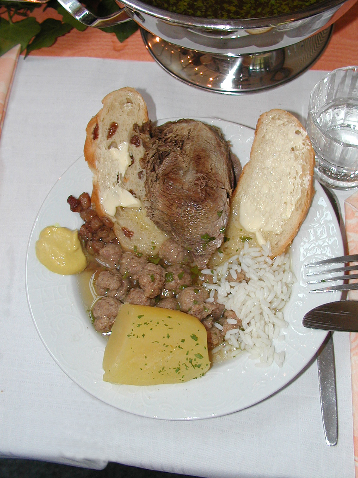 Die Hadler Hochzeitssuppe alles zusammen auf einen Teller